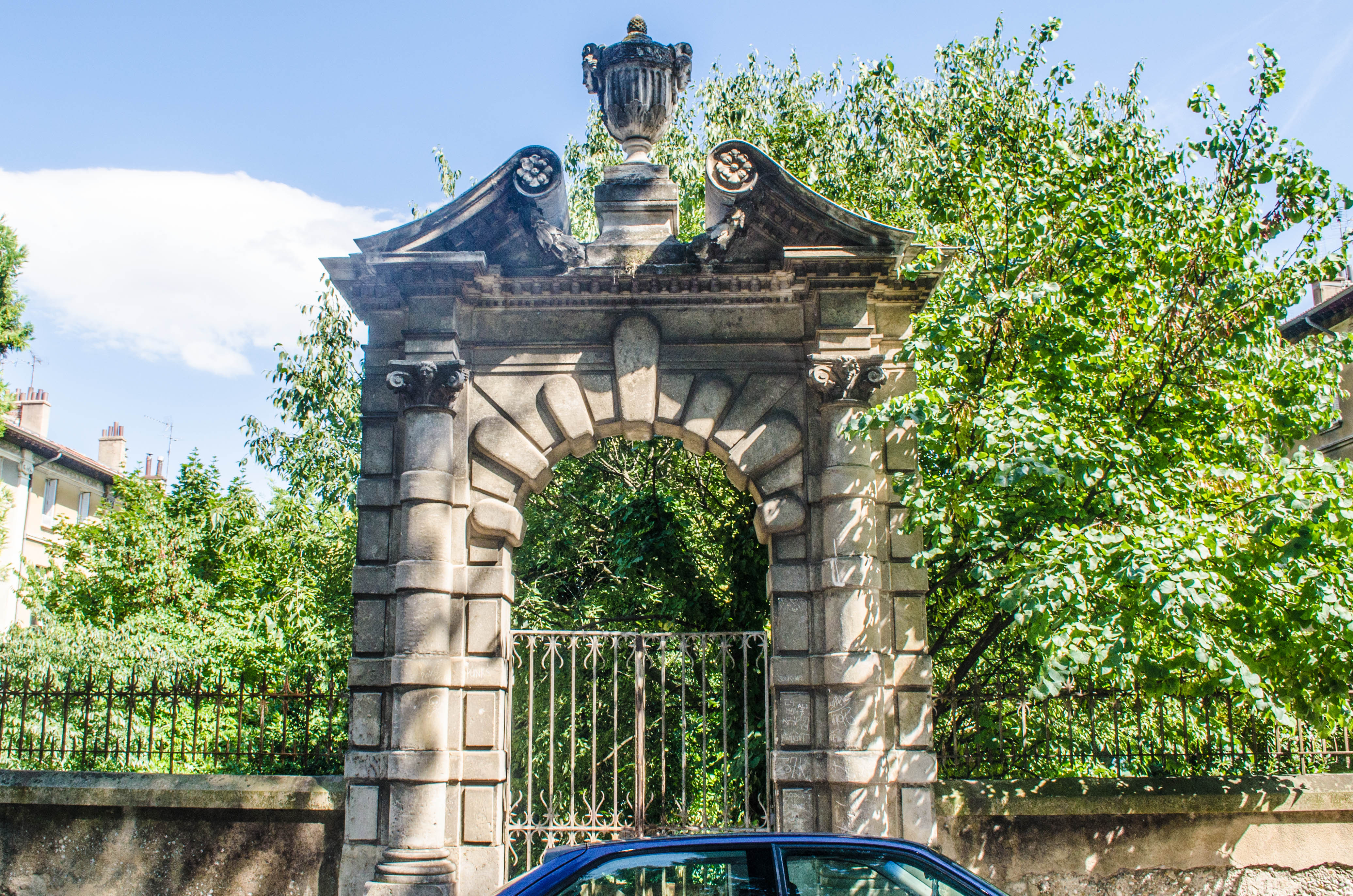 Valence (Drôme, France), cité des Officiers, par Casimir Genest (1846-1918), portail du jardin